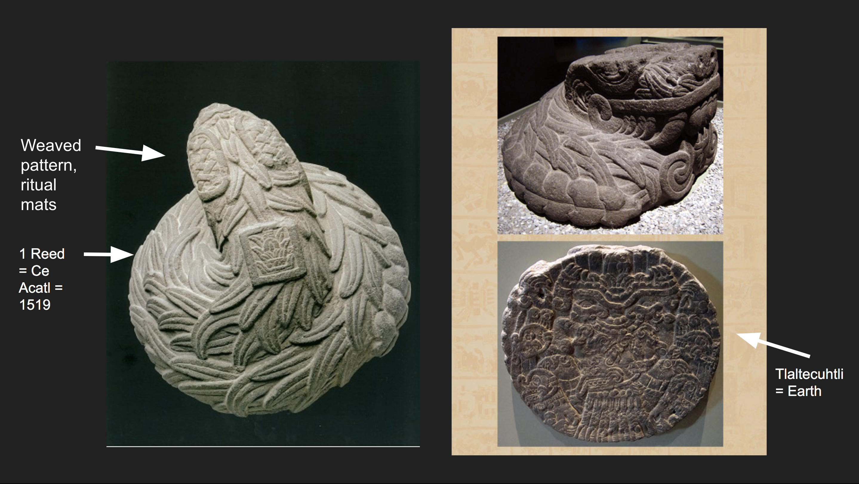 Imagen Anotada de la Serpiente Emplumada o Escultura de la Serpiente Plomada de la Parte Superior e Inferior